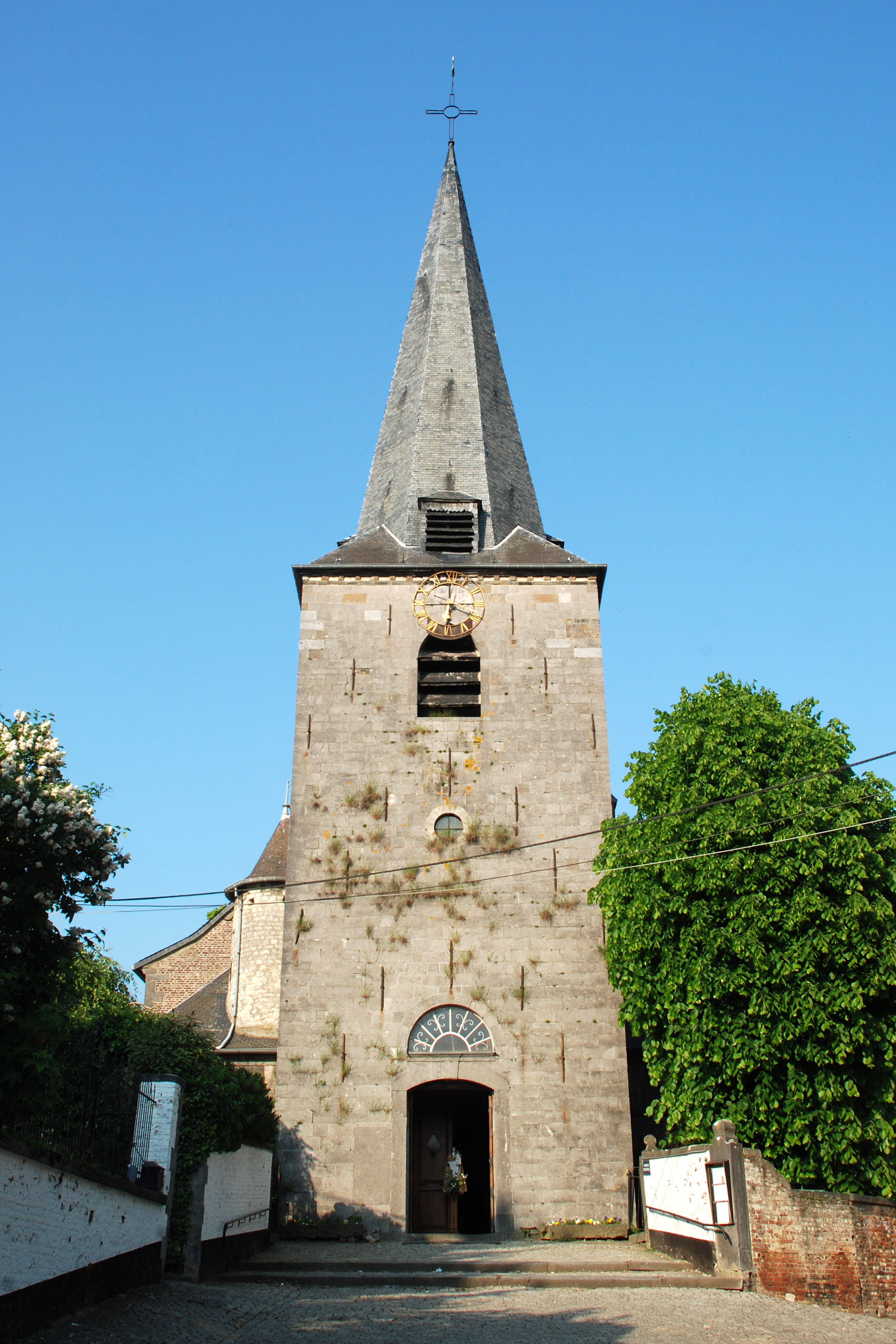 Belgique - Brabant wallon - Église de Court-Saint-Étienne